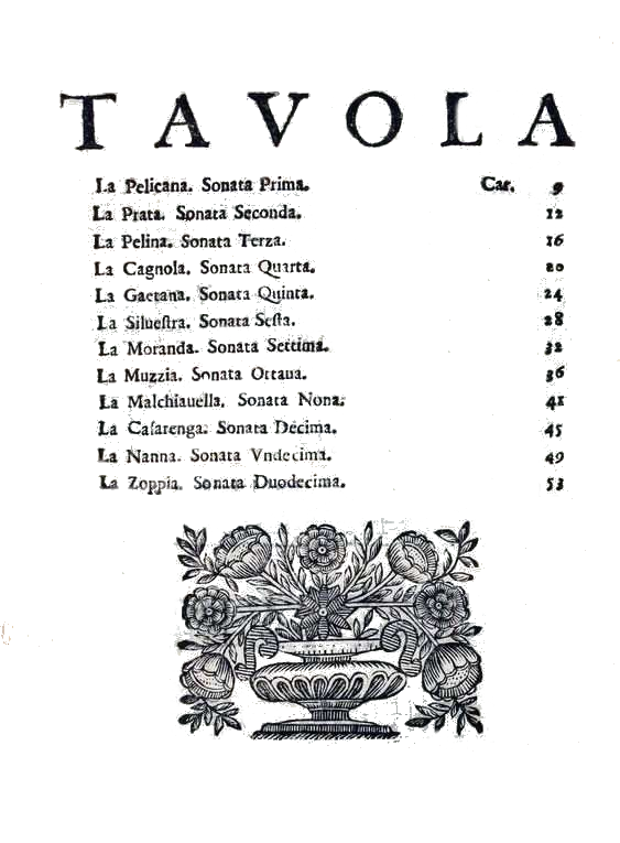 Table des douze Sonate a due istromenti… opus 55 de Maurizio Cazzati, publiées à Bologne en 1670.